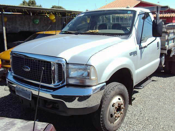 Brazilian market Ford F-4000